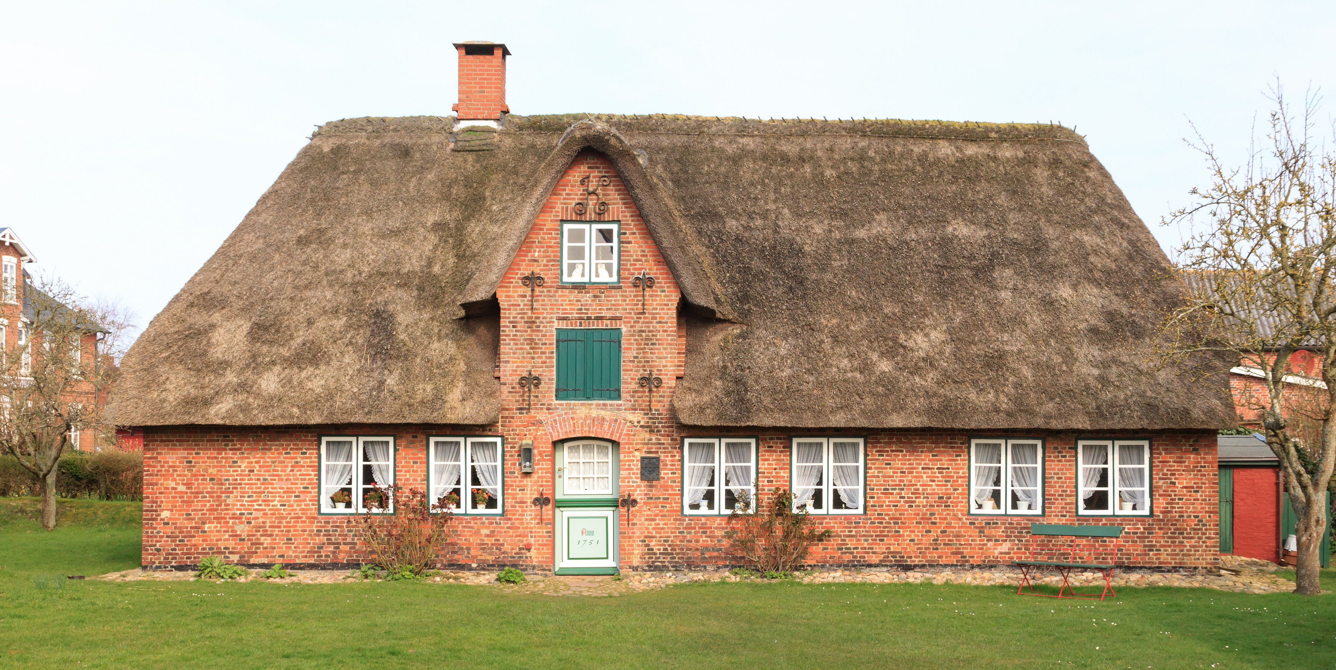 Öömrang-Huus